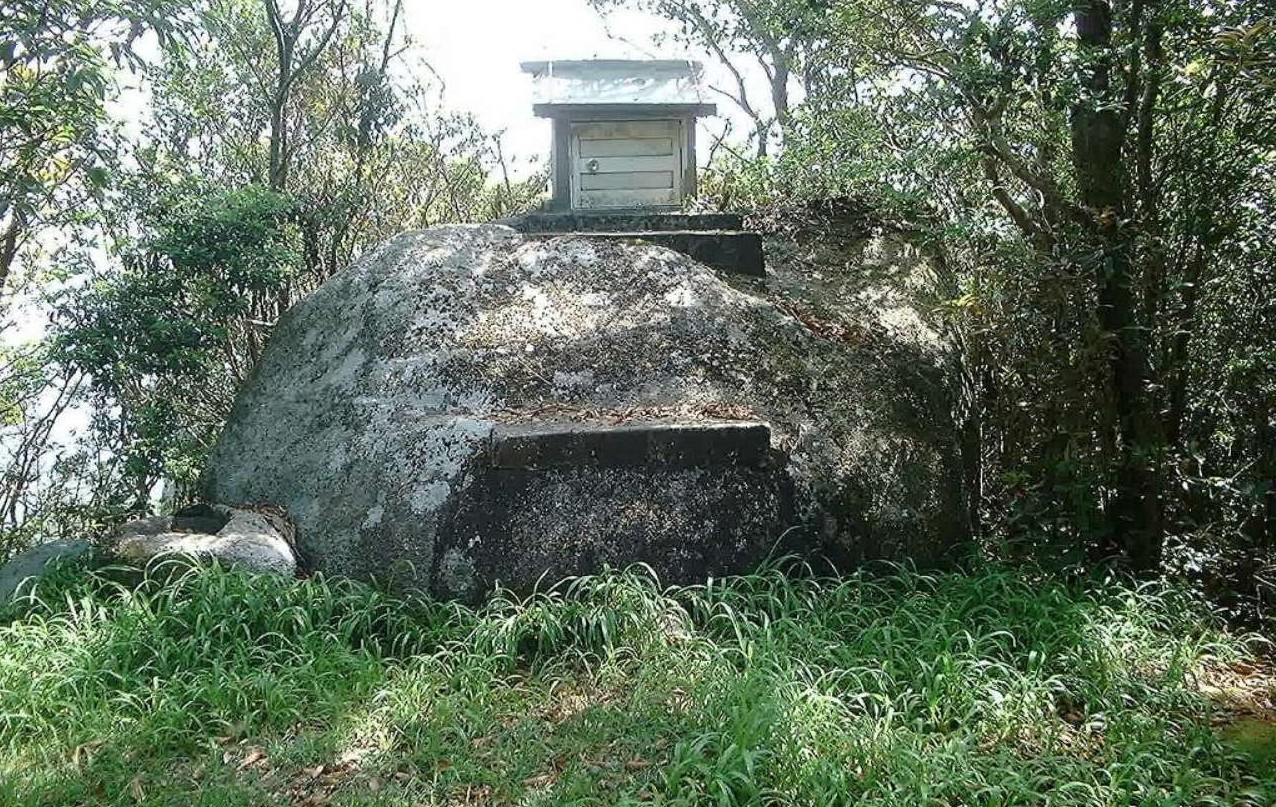 白皇山の山頂にある祠